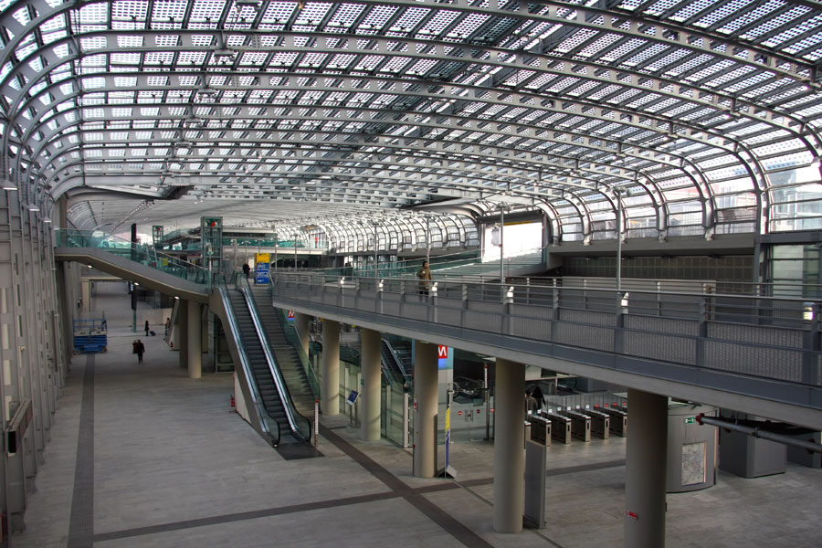 Interno della galleria della nuova stazione di Torino Porta Susa